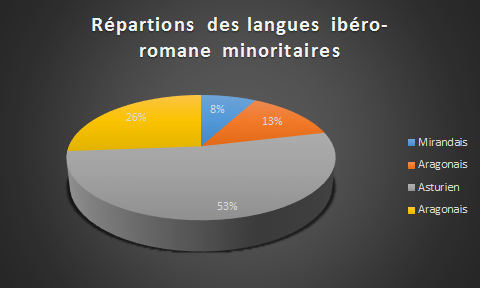 représentation graphique de donné provenant Wikipedia extraite a partir de donné textuelle